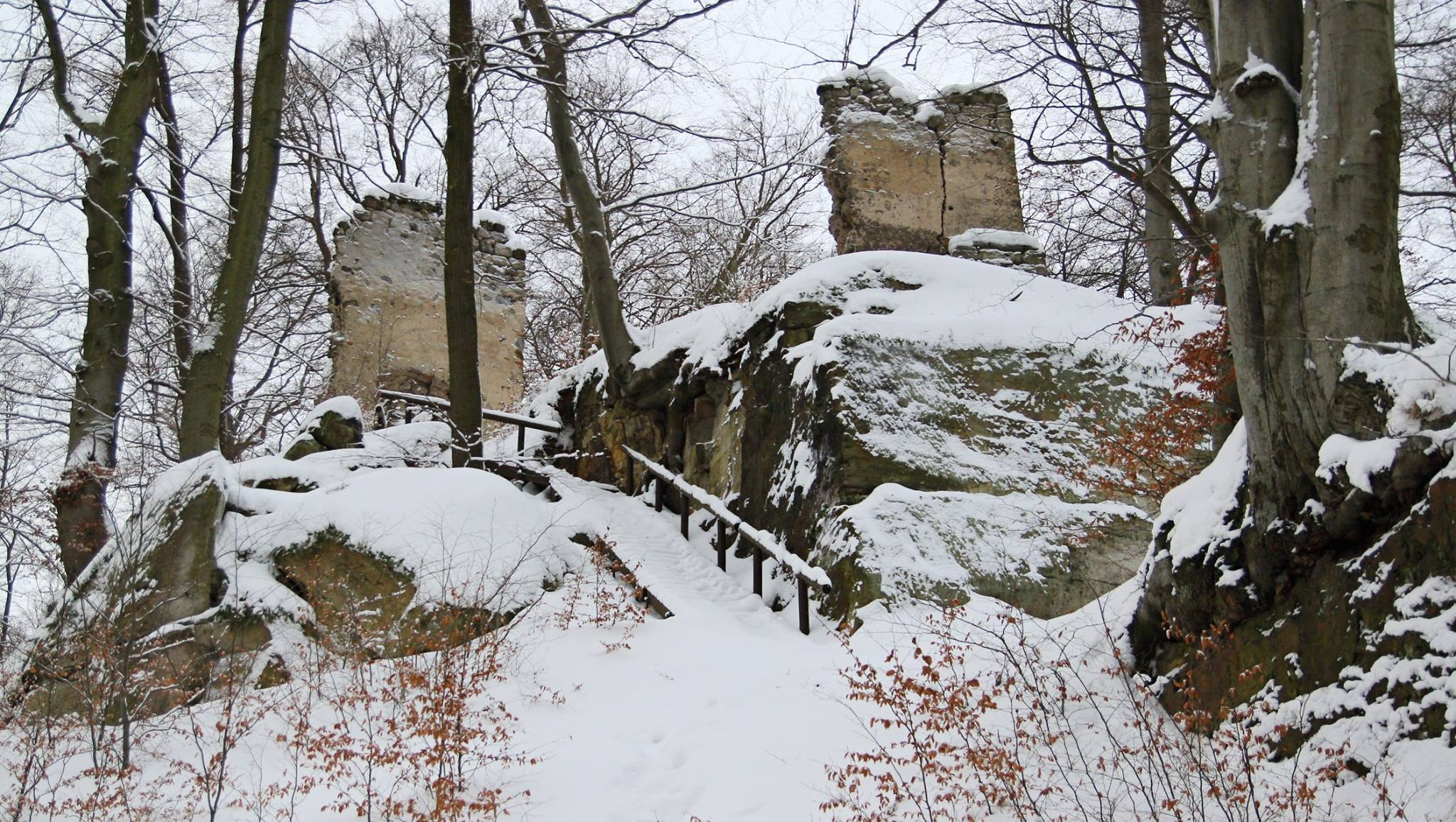 Zřícenina hradu Děvín u České Lípy